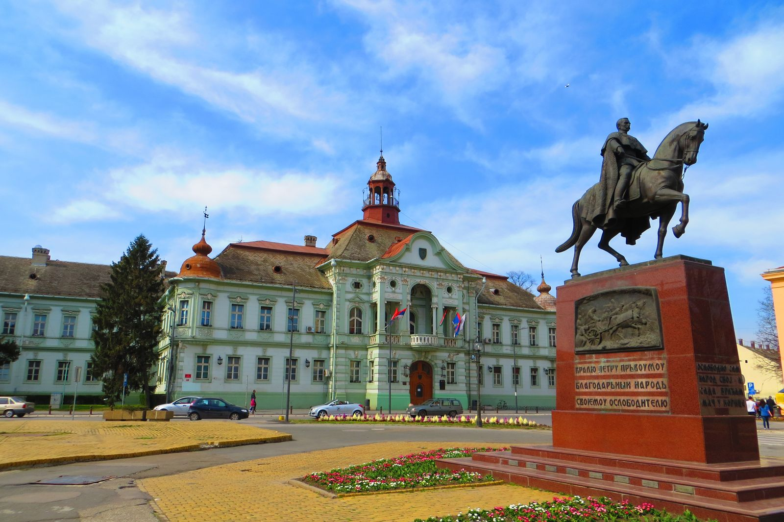 Hlavní náměstí v Zrenjaninu se sochou Petra I., Srbsko